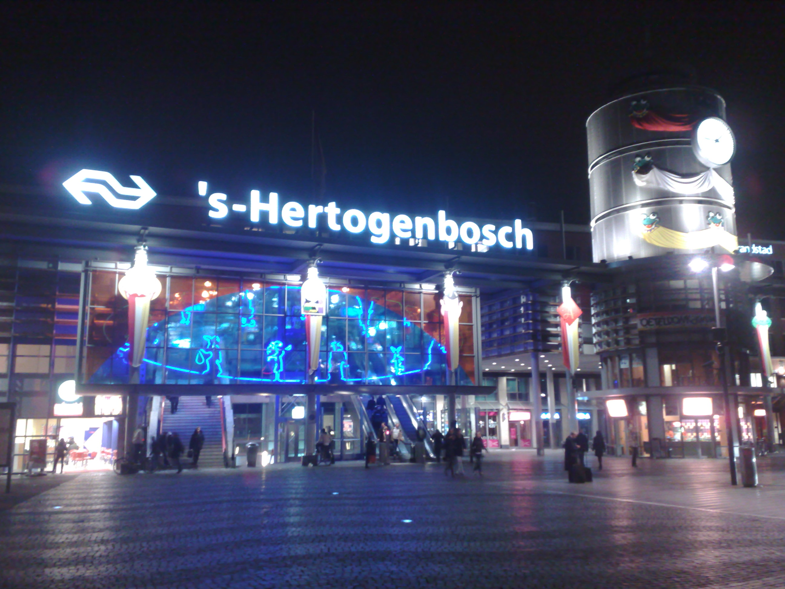 Zicht op een deel van de centrumkant van het Station van 's-Hertogenbosch in 's-Hertogenbosch in de avond